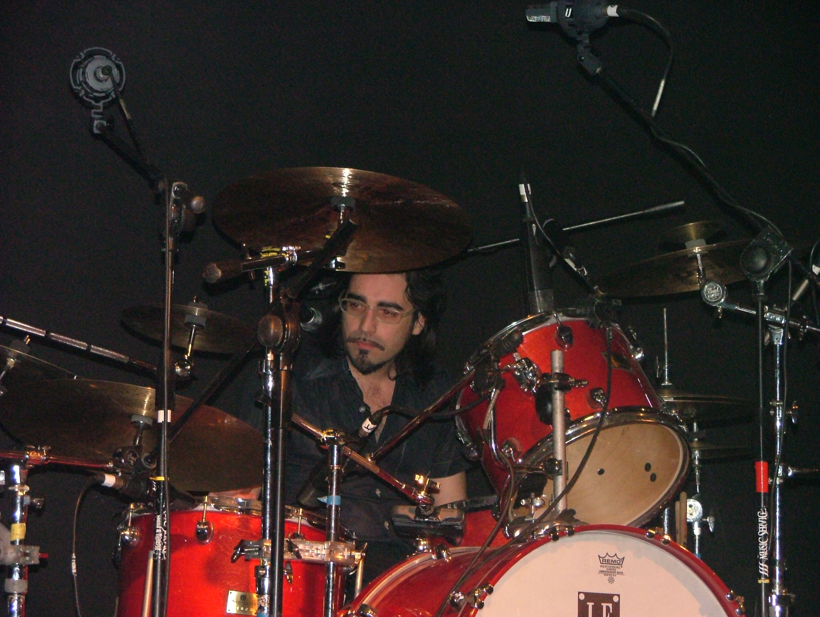 Marlene Kuntz@Hiroshima Mon Amour - 2006.02.02